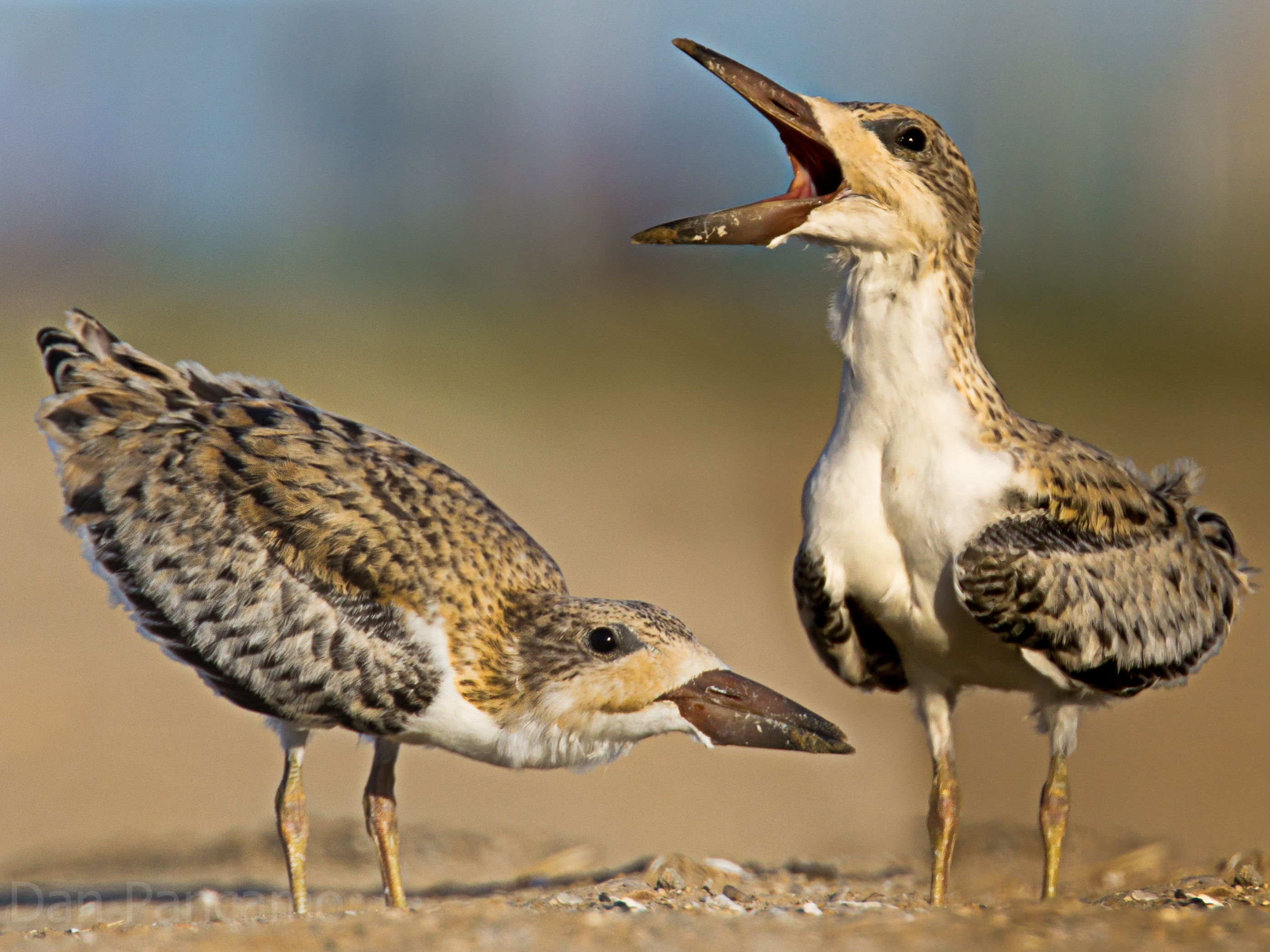 Black Skimmer Chicks